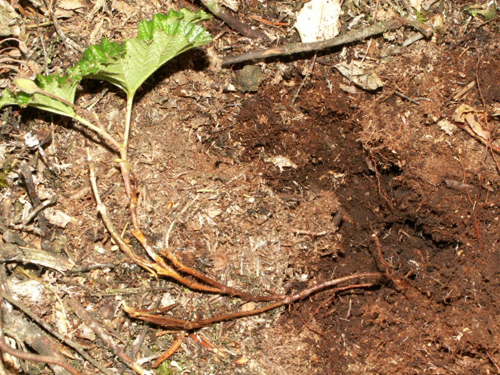 Rubus chamaemorus Wurzel, Staengel, Nebenblaetter